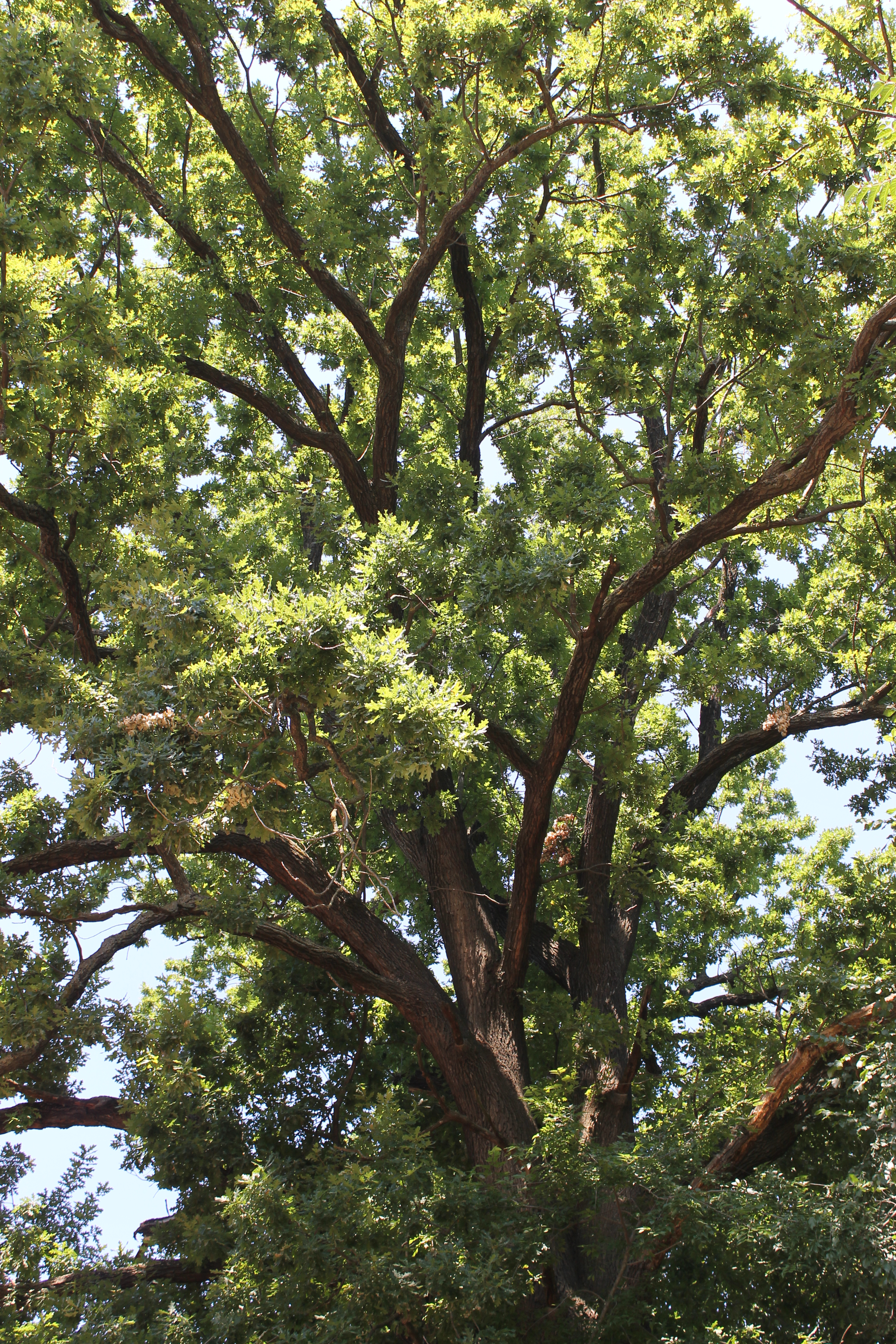 Природни споменик Храст лужњак